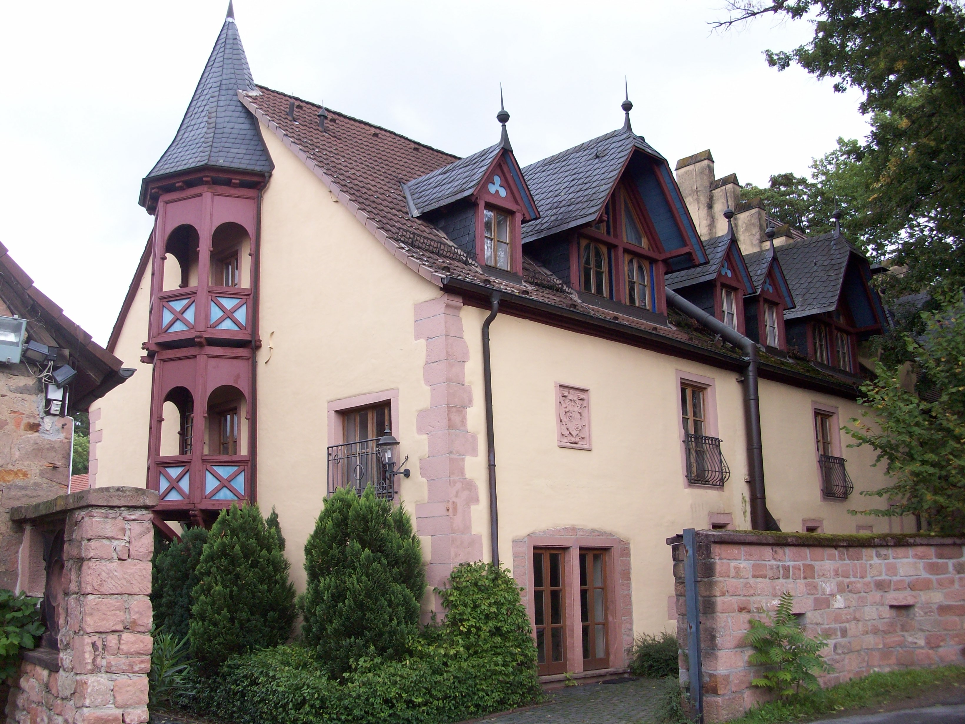 Schloss Weyberhöfe im Weiler Weiberhof der Gemeinde Sailauf, Lkrs. Aschaffenburg, Unterfranken, Bayern. Südlicher Querriegel mit Mainzer Wappen